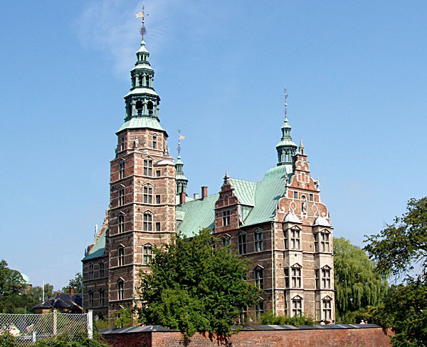 Rosenborg Castle, Copenhagen, Denmark